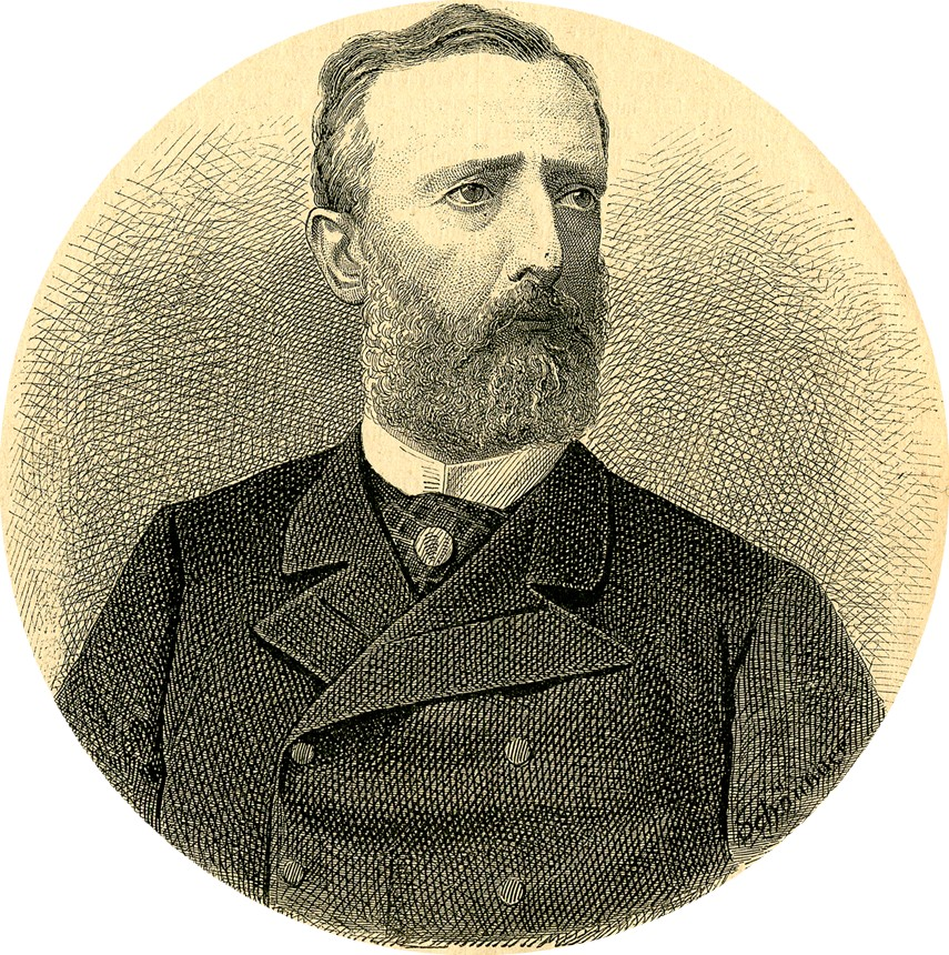 Siegfried Salm-Reifferscheid (1835 - 1898), Rakouský a český šlechtic a politik.